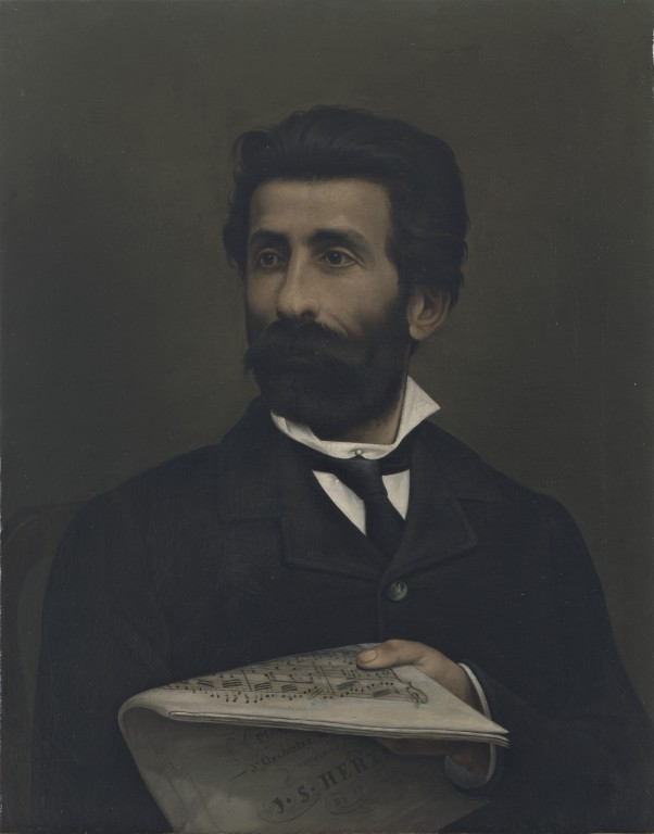 Antonio Ferri, Ritratto di Carlo Andreoli (Museo civico, Mirandola)